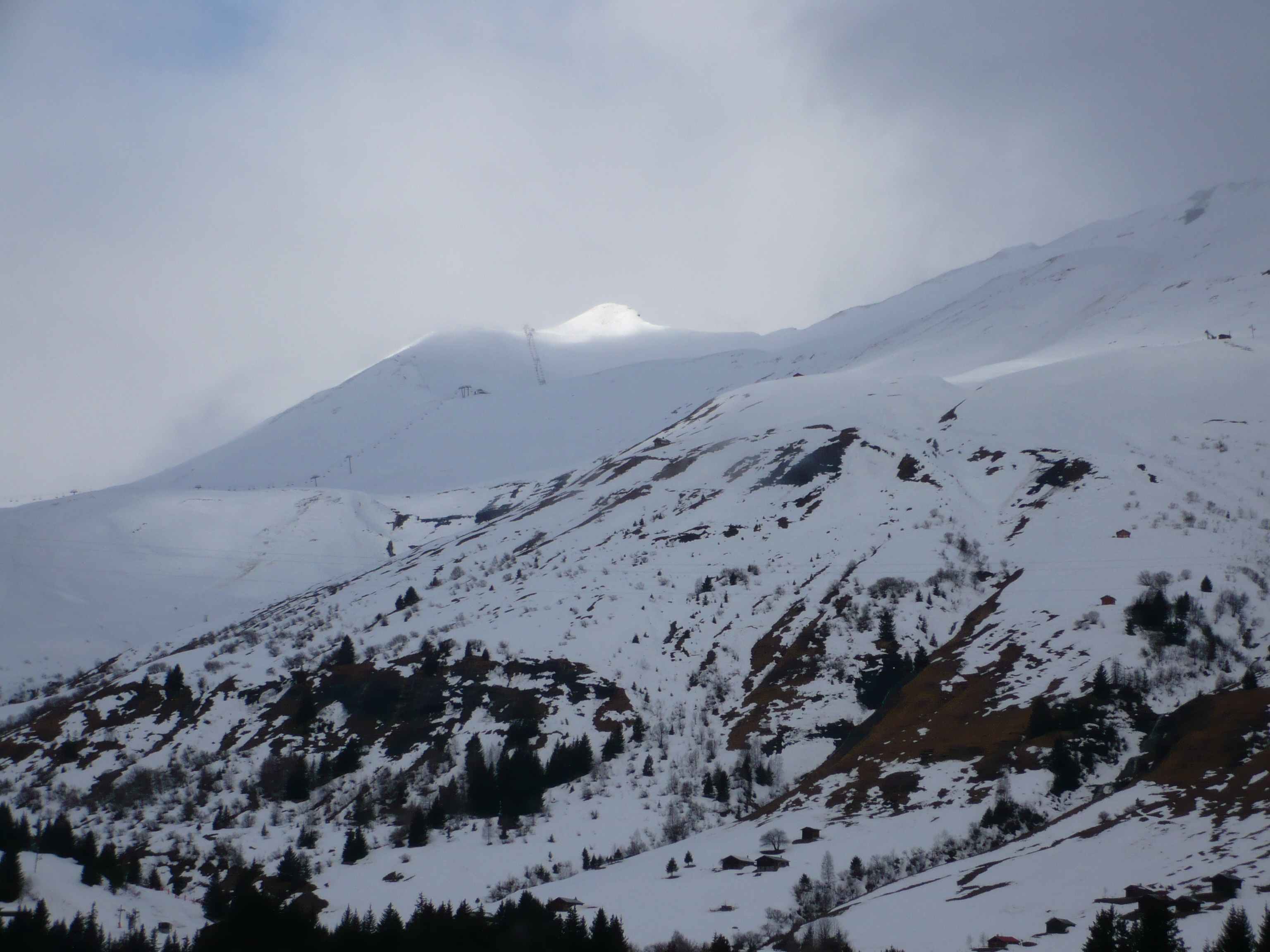 L'Aiguille croche vue depuis les Tappes